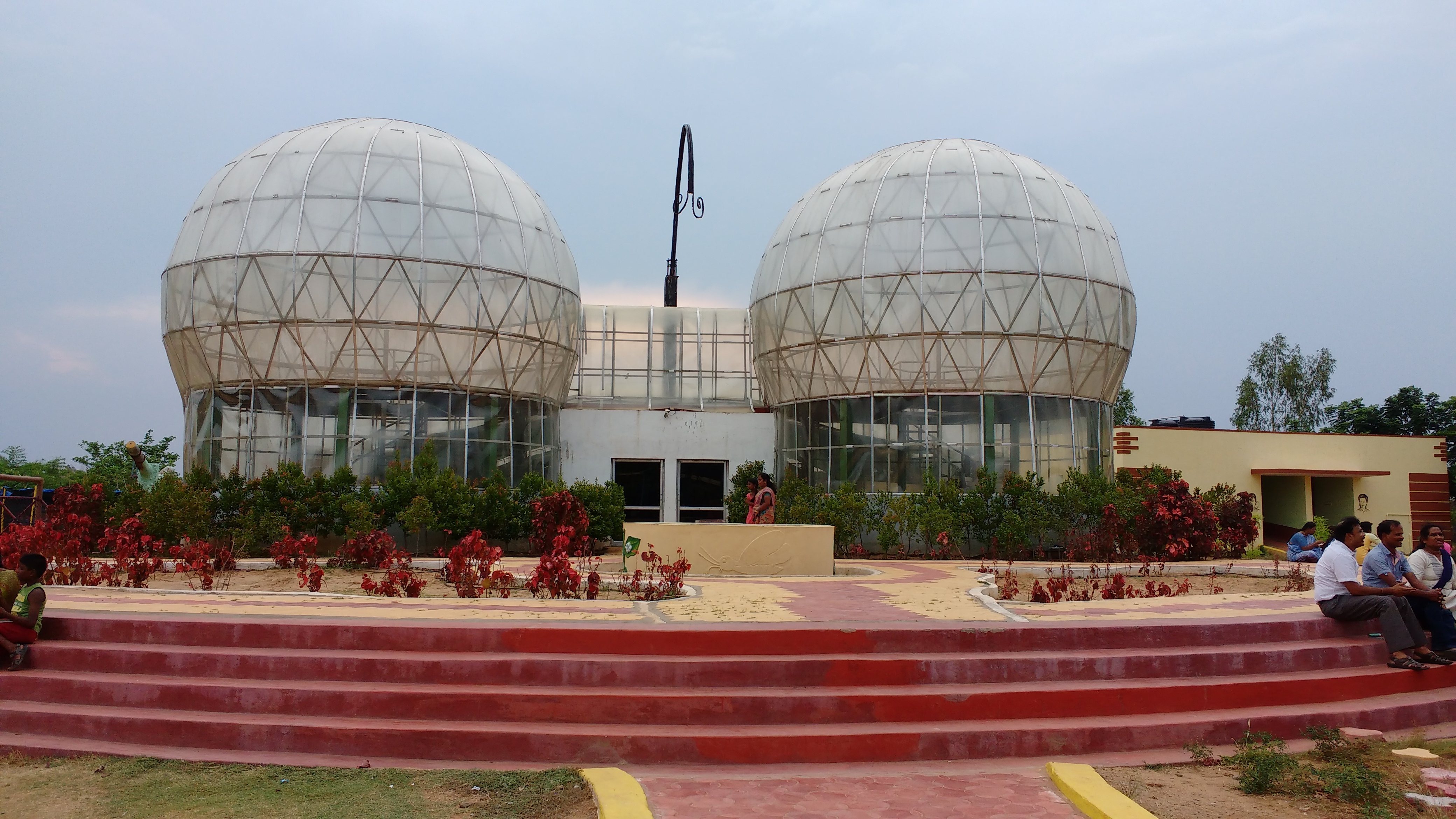 ஸ்ரீரங்கம் வண்ணத்துப்பூச்சி பூங்காவின் இனப்பெருக்க மையம்